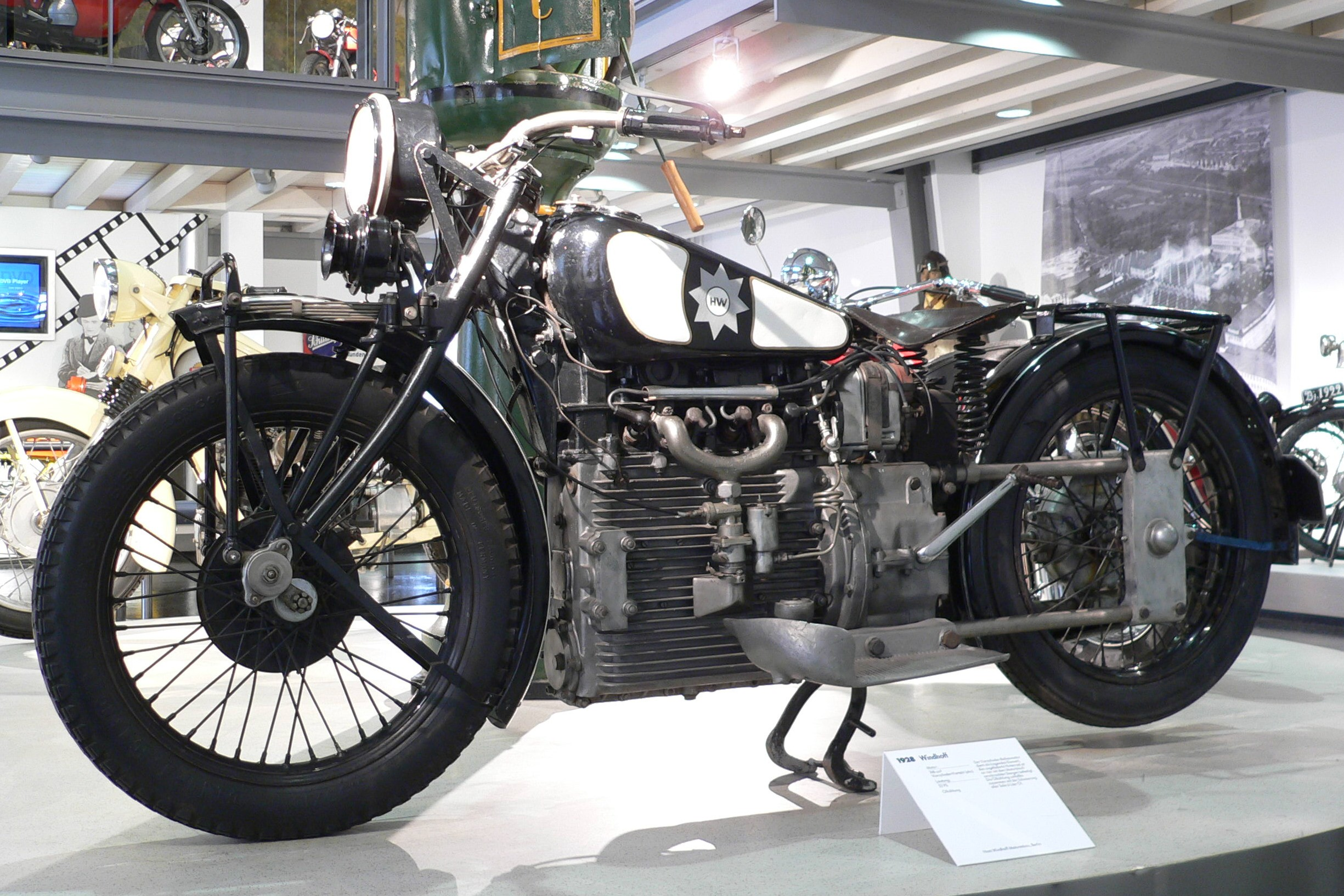 motorbike "Windhoff" (1928) by company "Hans Windhoff Motorenbau, Berlin" (748 cm³, Vierzylinder-Viertakt-Motor, 22 PS bei 4.000 U/min, Ölkühlung, 130 km/h)